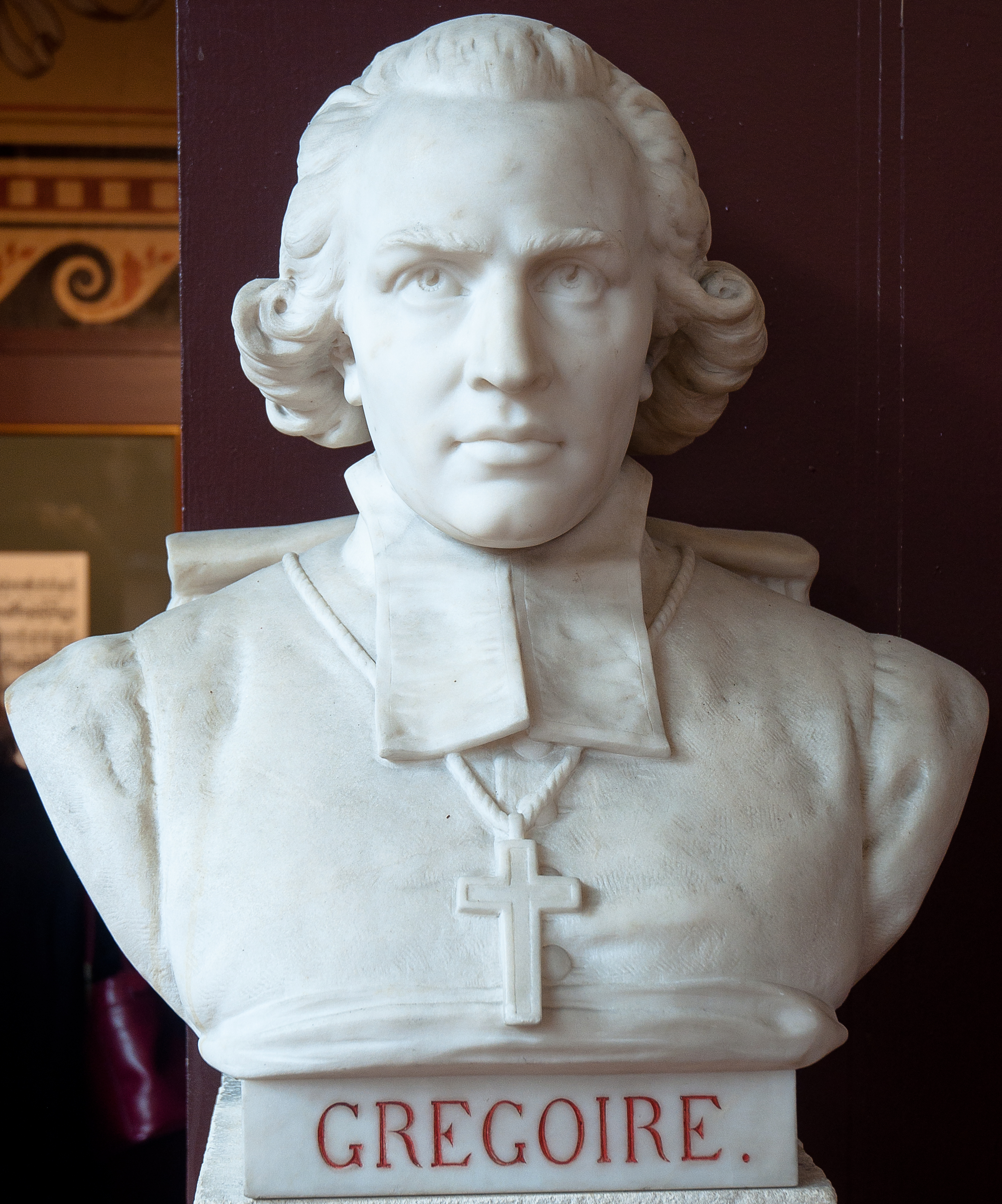 Buste de Abbé Grégoire -- Salle du serment du jeu de paume -- Versailles